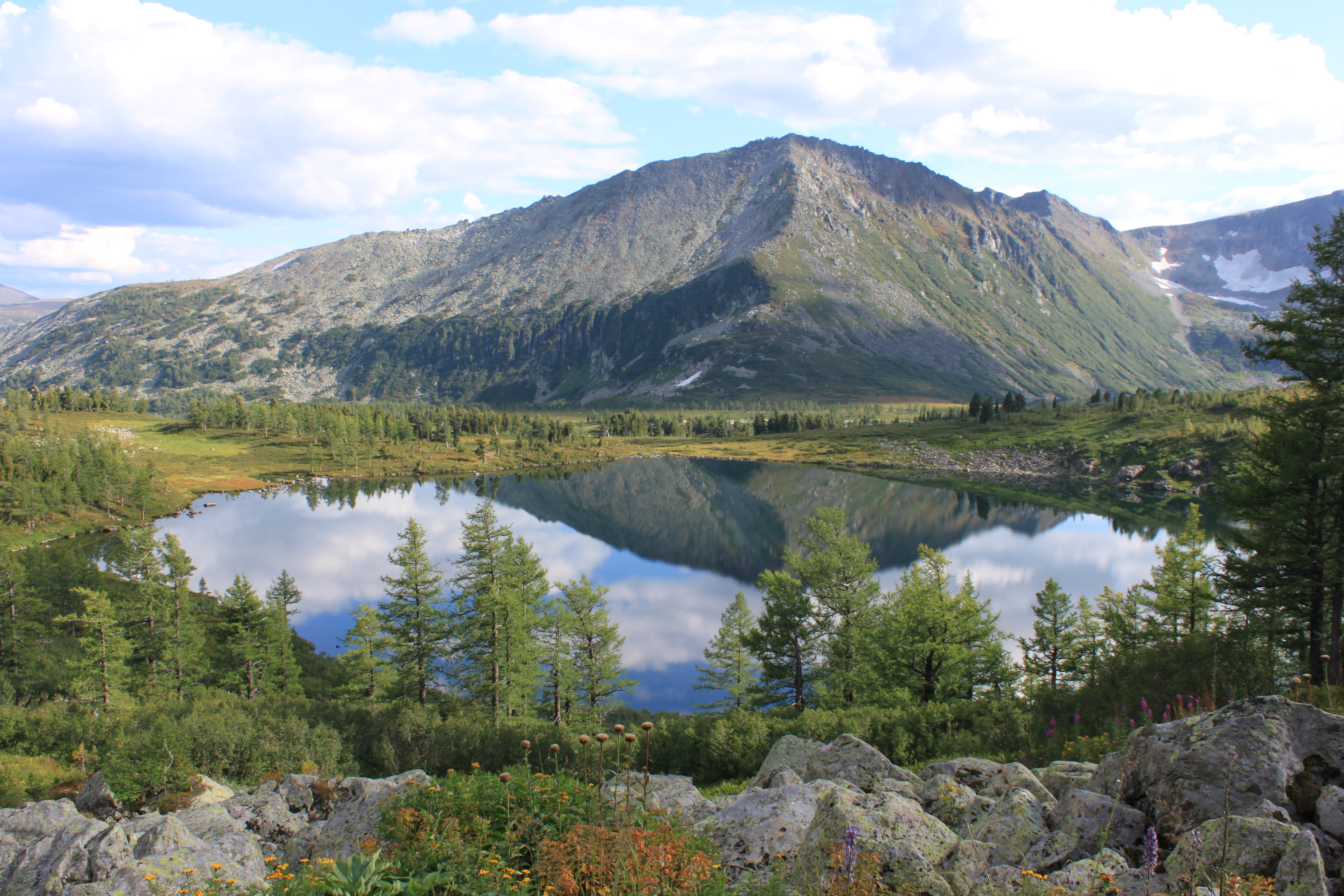 Поднебесные зубья, Междуреченский район This image is related to the protected area of Russia number 4210013